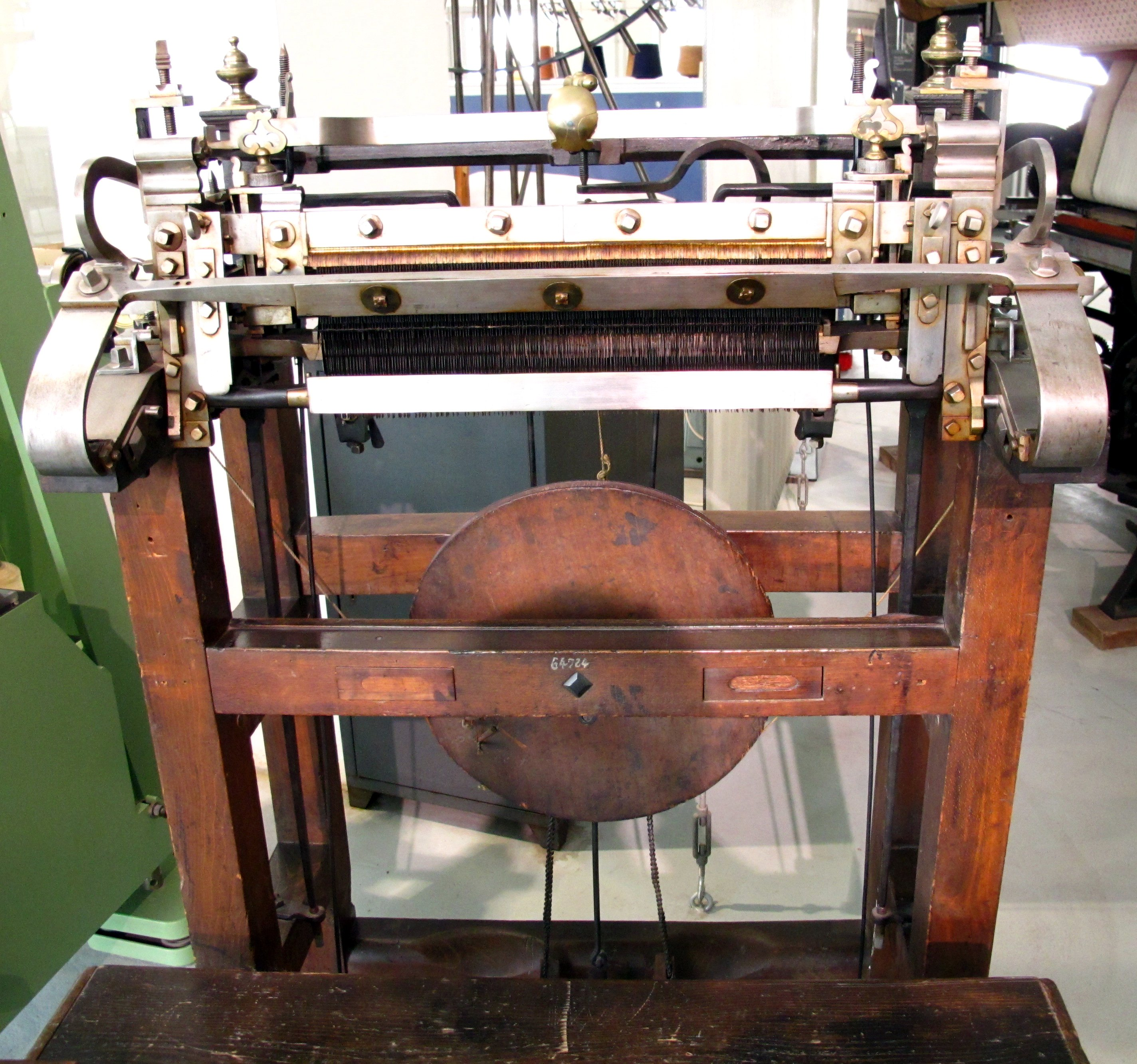 Strumpfwirkstuhl oder Handkulierstuhl, um 1820